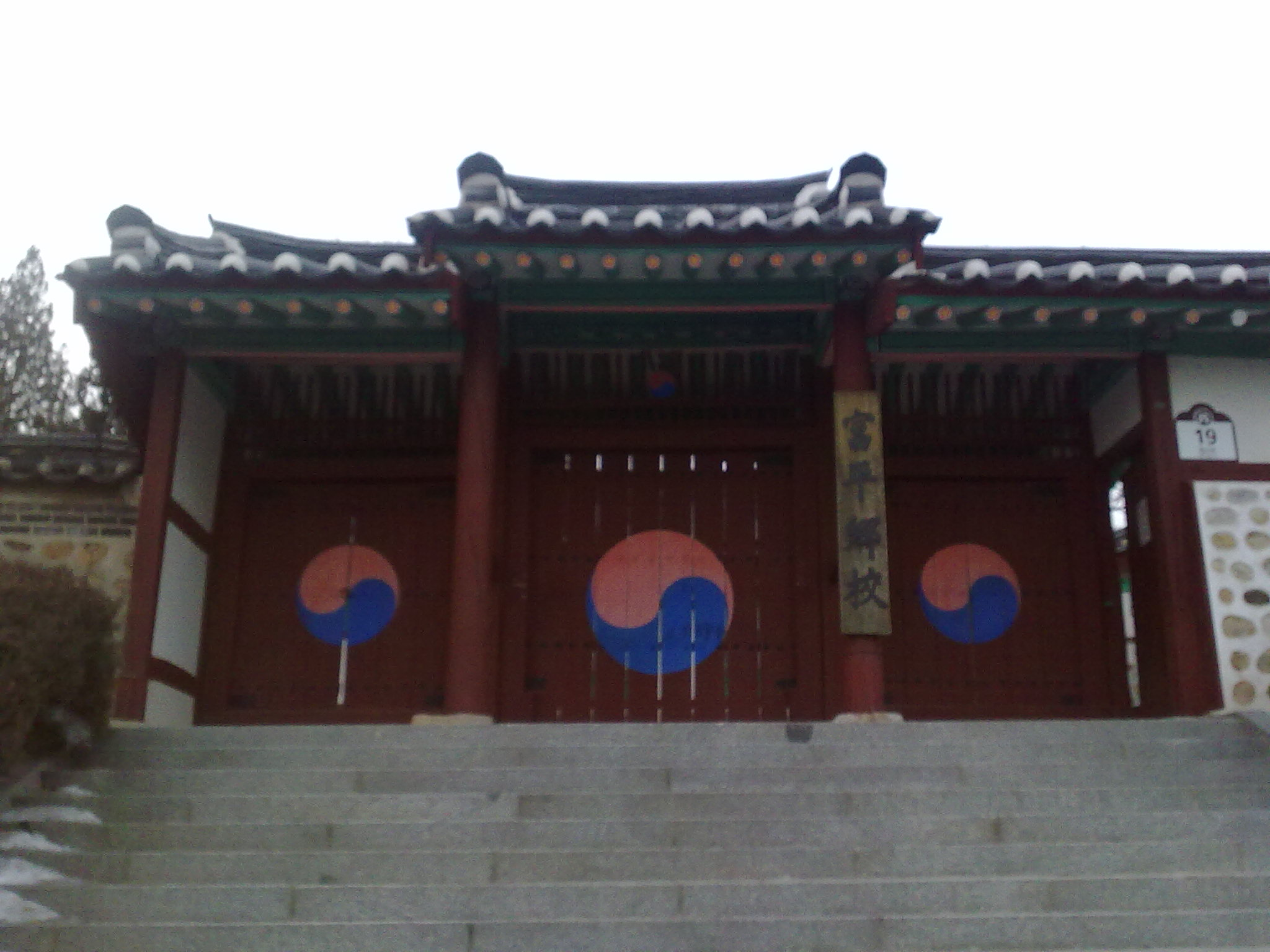 부평향교의 정문